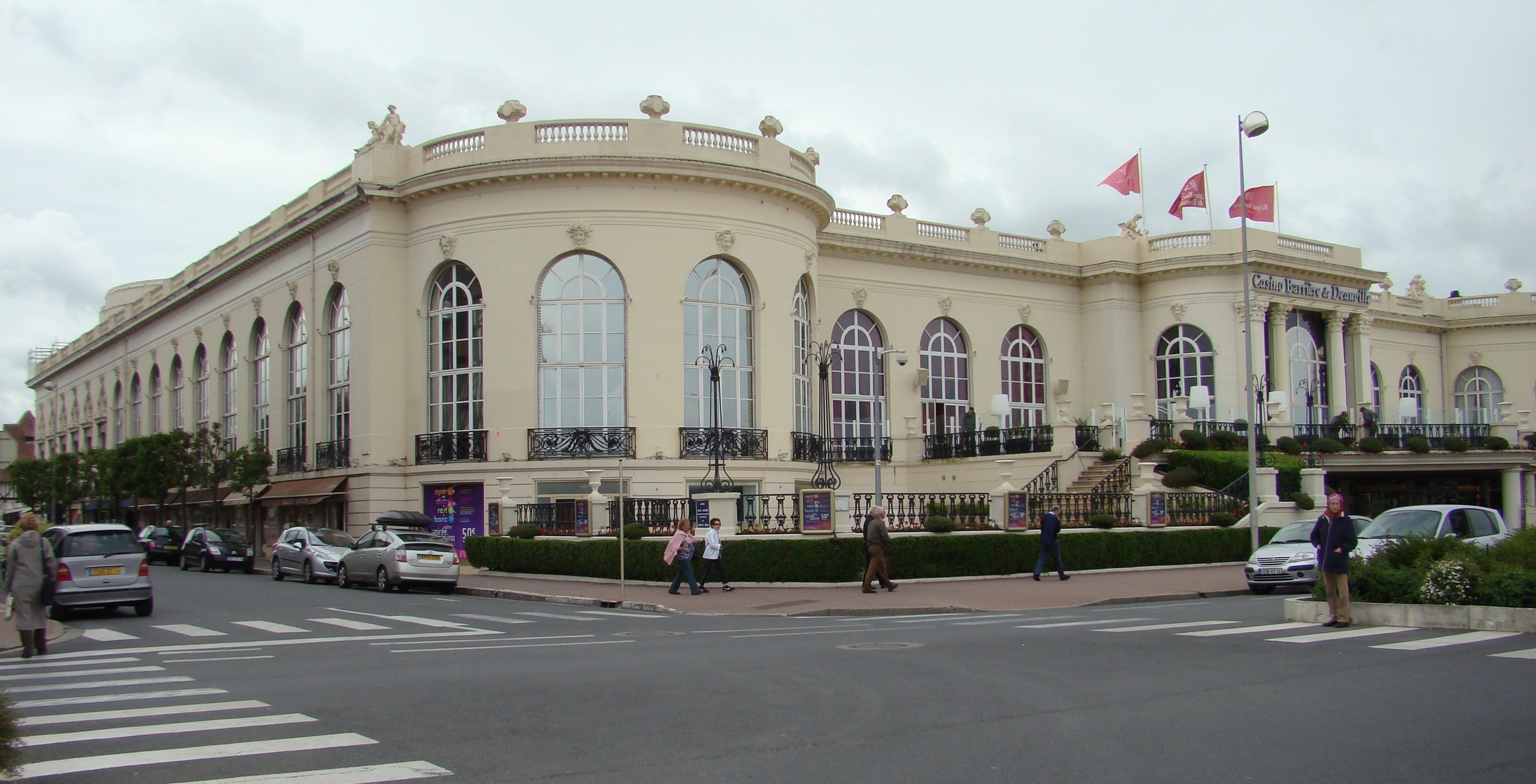 Casino von Deauville (Normandie)